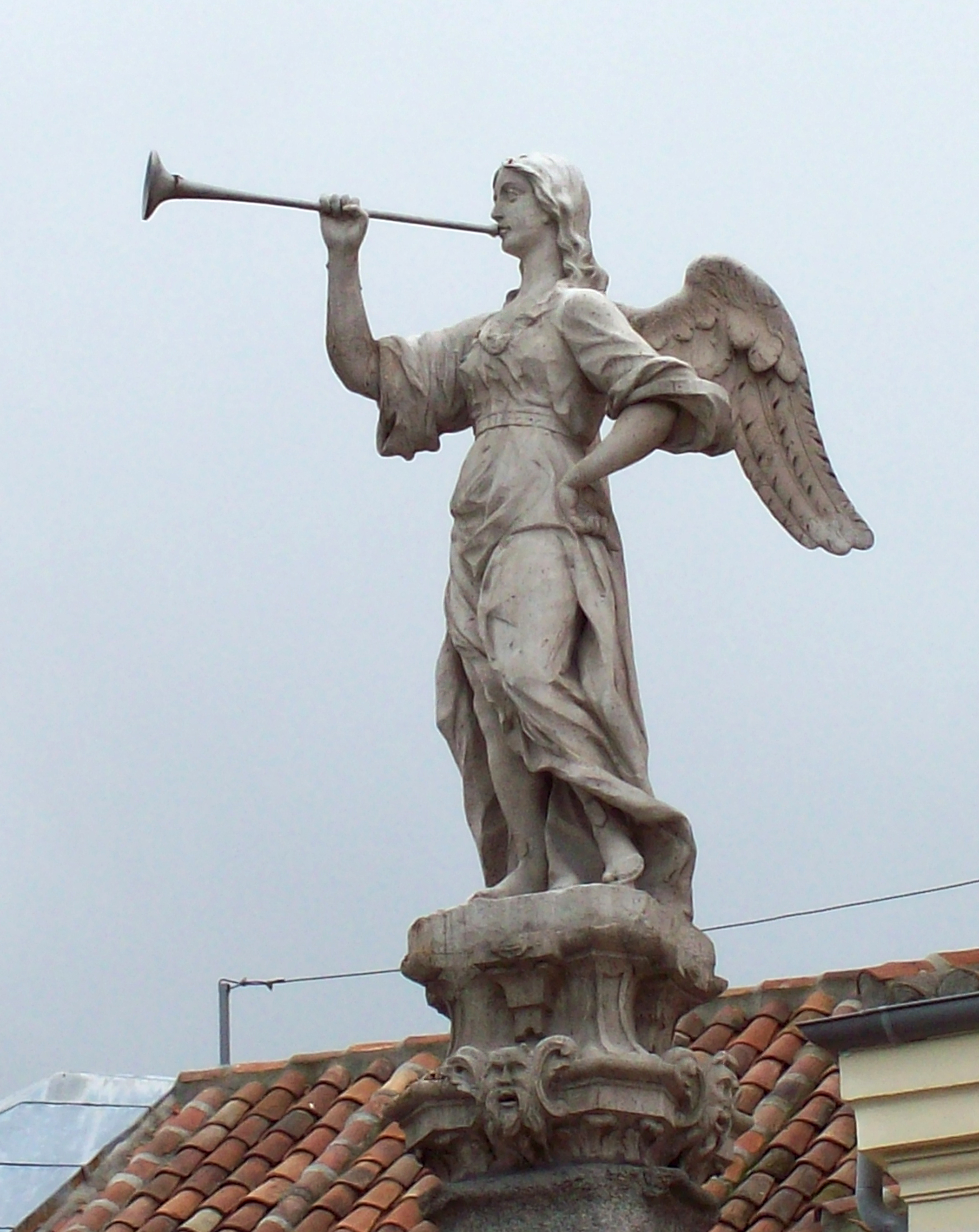 Pheme